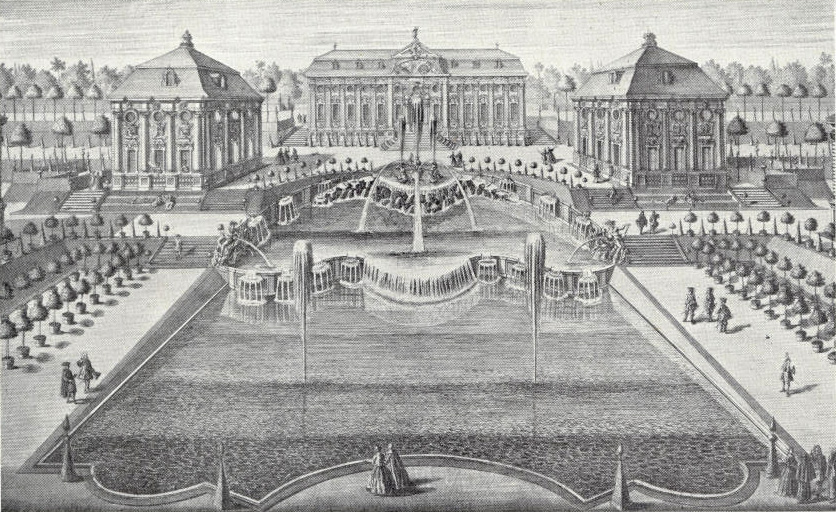 "Prospect der grossen und Wasserreichen Cascade, beyde Fluß, den Rhein und Mayn vorstellend" - Detailansicht der Orangerie mitsamt Cascaden der Favorite nach einem Stich von Salomon Kleiner, 1726